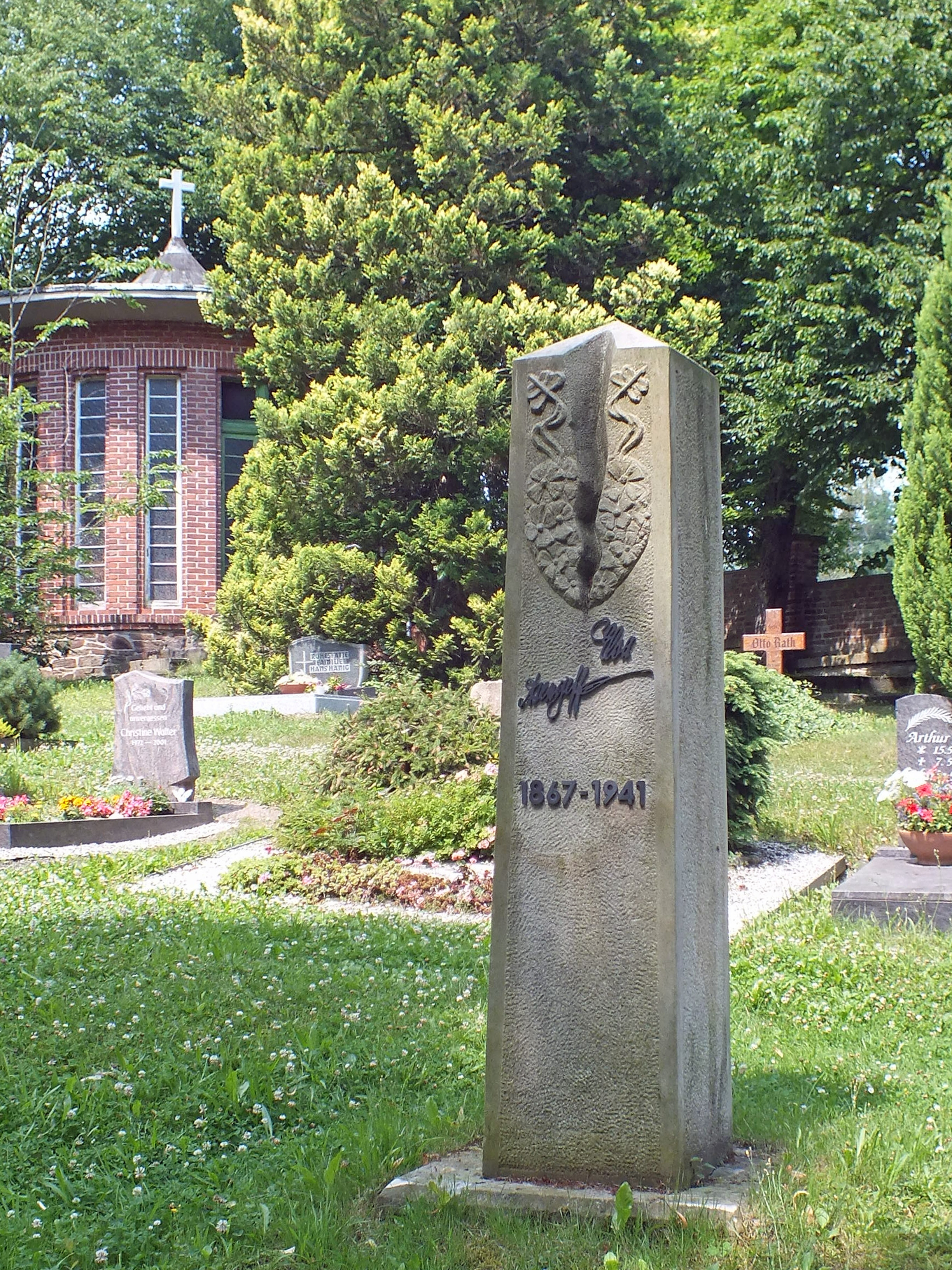 Gedenkstele für Elsa Asenijeff auf dem Friedhof in Bräunsdorf bei Freiberg in Sachsen gestiftet vom Kulturhof e.V. Kleinvoigtsberg, gestaltet vom Bildhauer Olaf Klepzig, Rabenau Eine Tafel auf der Rückseite hat den Wortlaut: "Zum Gedenken an ELSA ASENIJEFF geb. 3. Januar 1867 Wien gest. 5. April 1941 Bräunsdorf / Anstalt DICHTERIN LEBENSGEFÄHRTIN des Leipziger Künstlers Max Klinger Dieser Denkstein wurde 2011 gestiftet vom Kulturhof e.V."